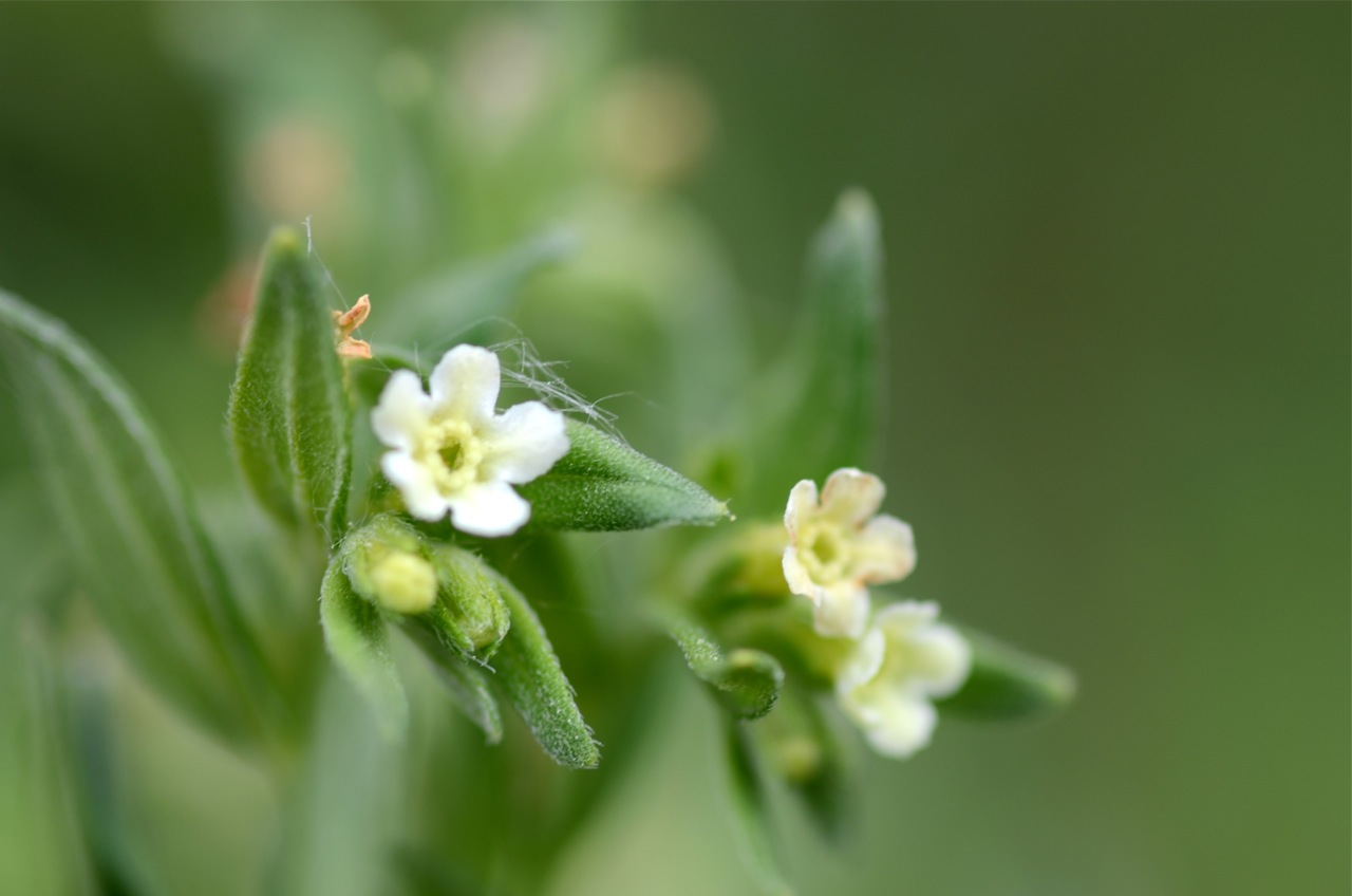 Buglossoides arvensis